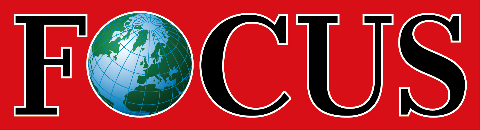 Logo des Focus